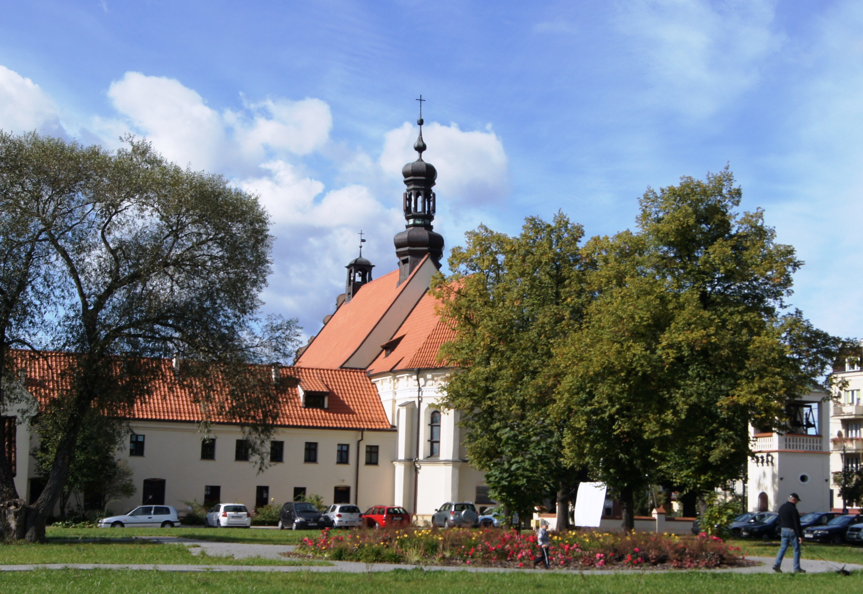 Toruń Podgórz, ul. Poznańska 49 - zespół klasztorny poreformacki: - kościół, obecnie parafialny pw. św. Apostołów Piotra i Pawła, 1644 r., XVIII w. - klasztor, obecnie plebania oraz klasztor franciszkanów, poł. XVII, XVIII w.